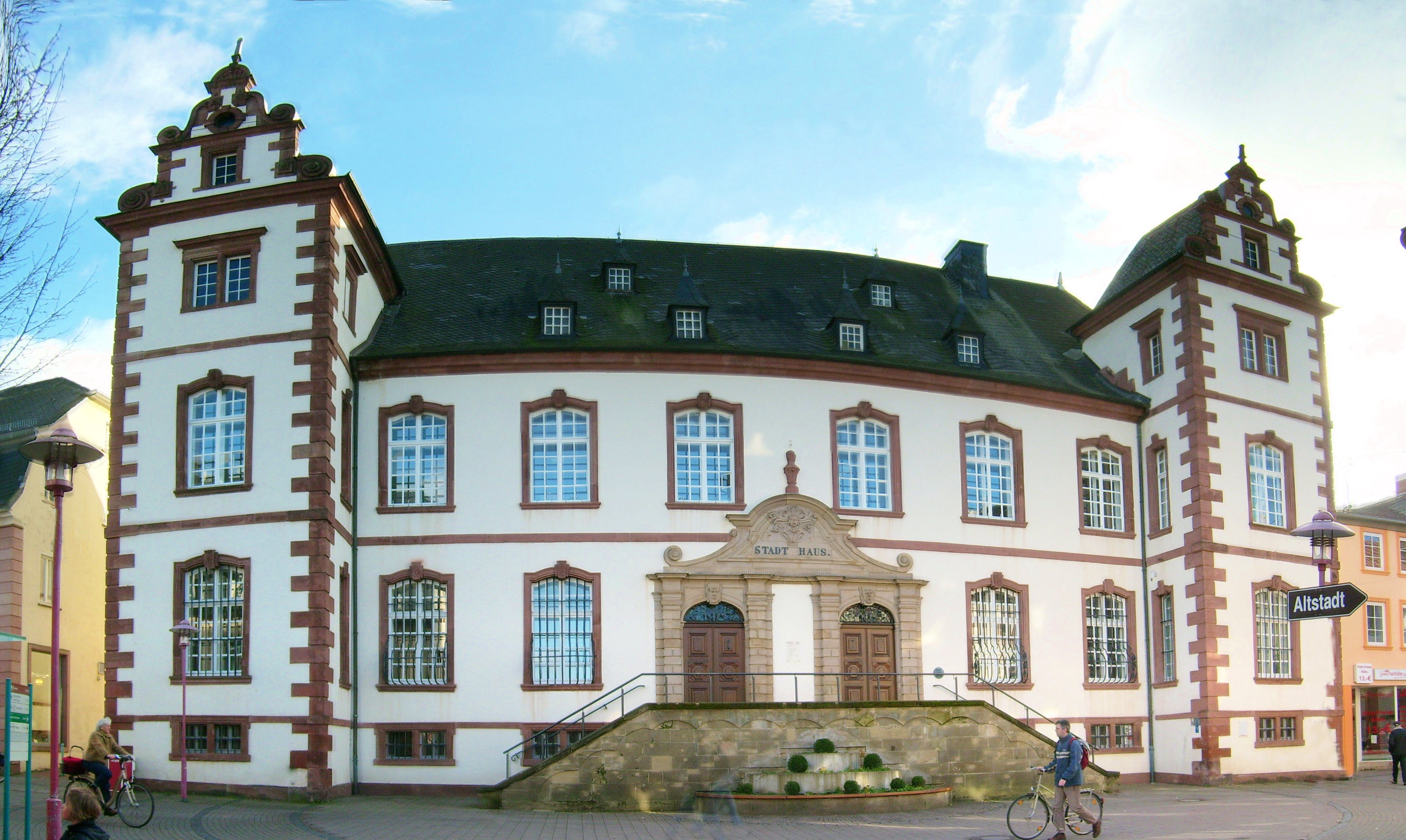 Rathaus in Merzig